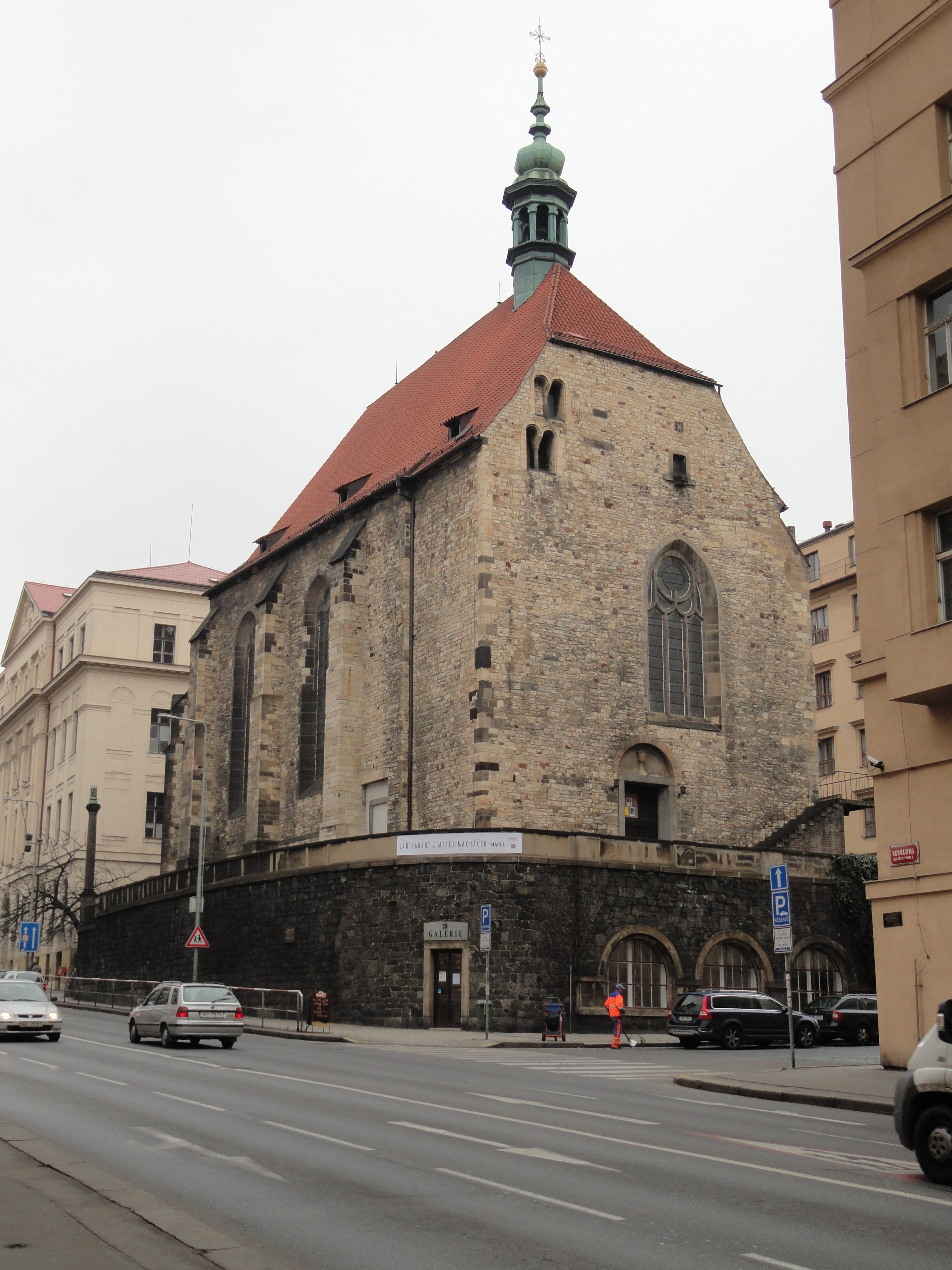 Pohled na kostel z Resslovy ulice.